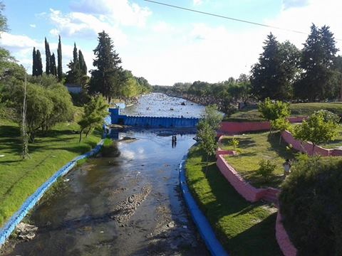 balneario municipal de la localidad turística de santa rosa del conlara, san luis, argentina.